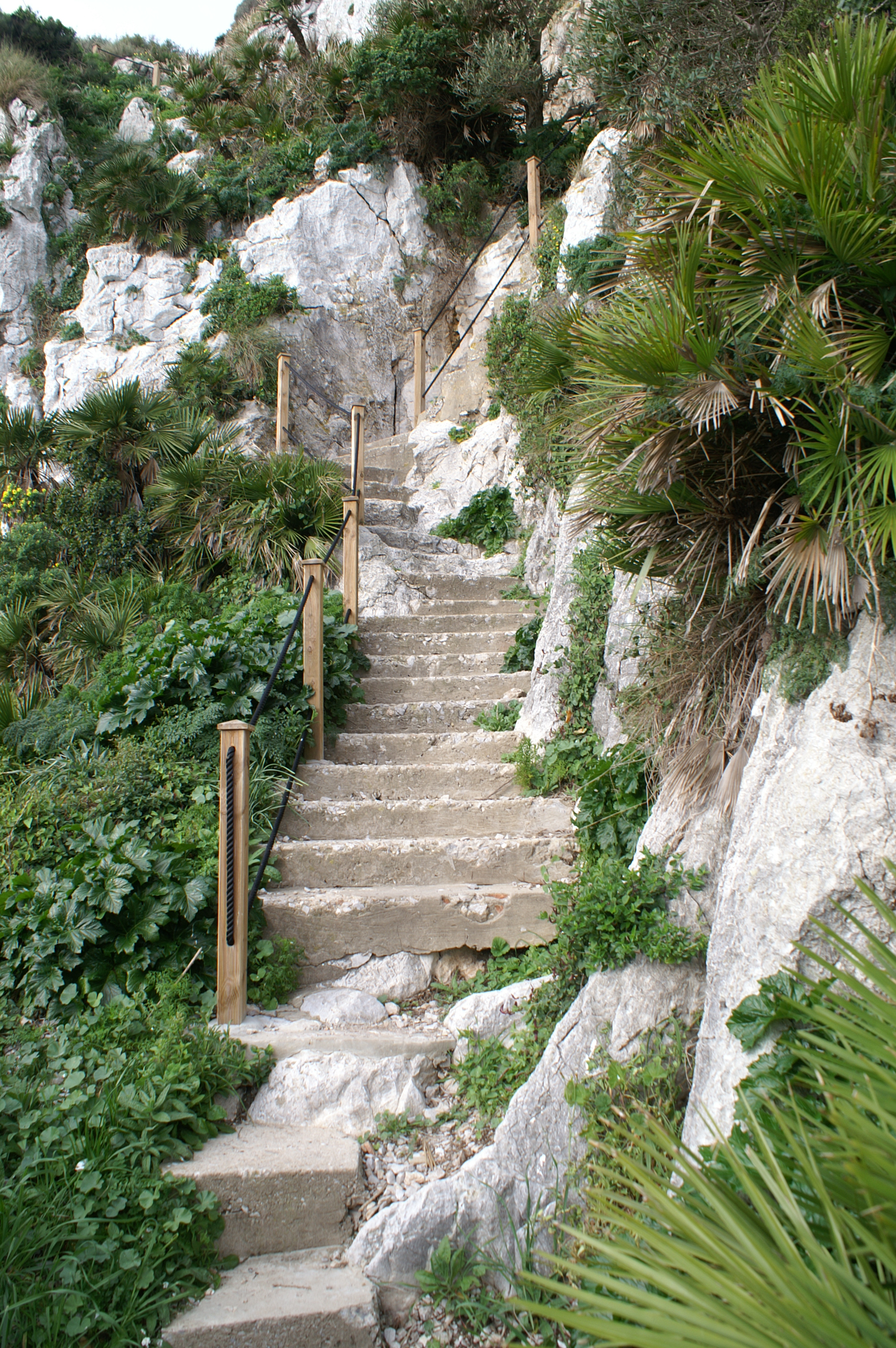 Natuur pad op rots van gibraltar